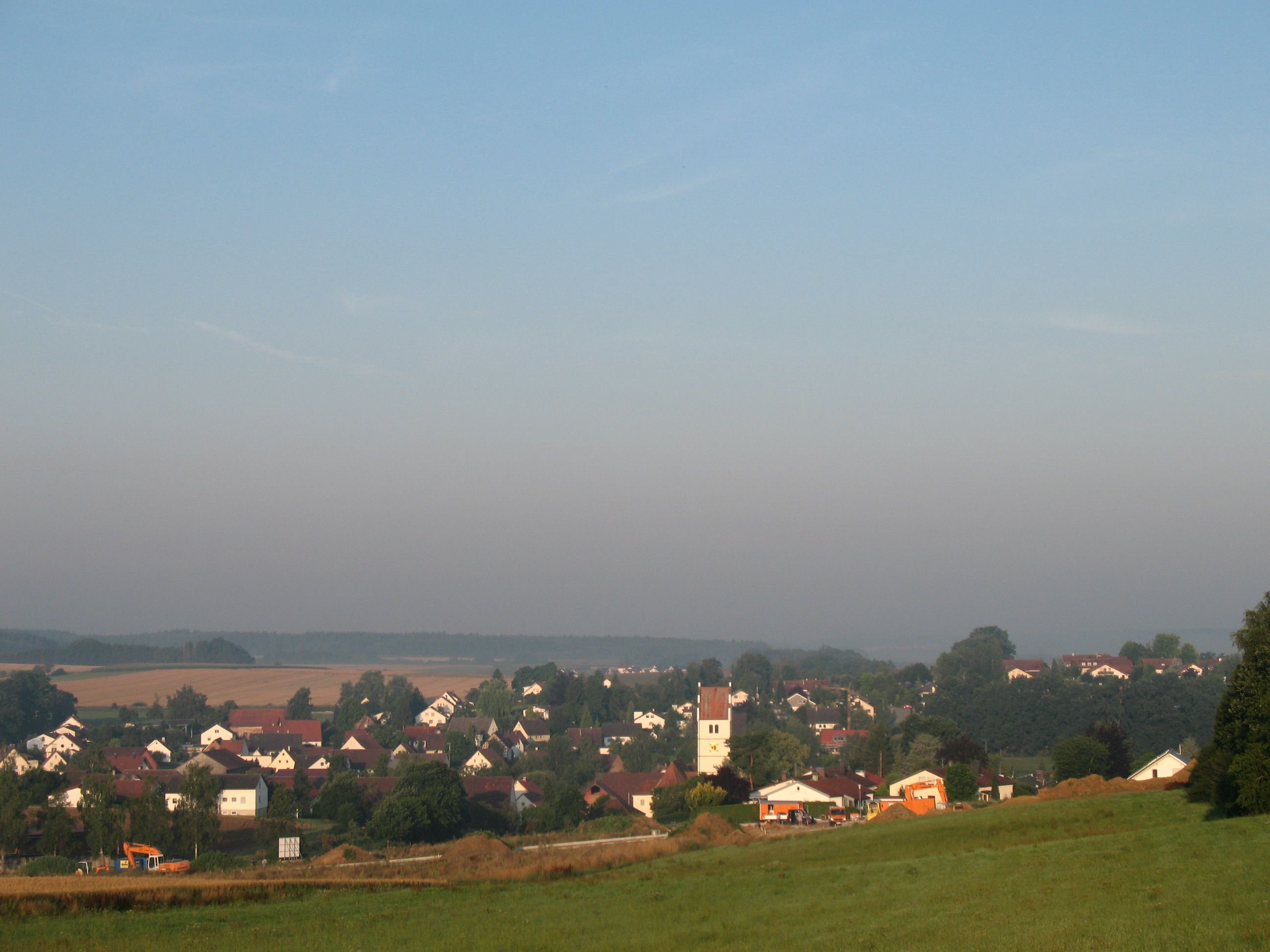 Blick von Osten auf Sulmingen.